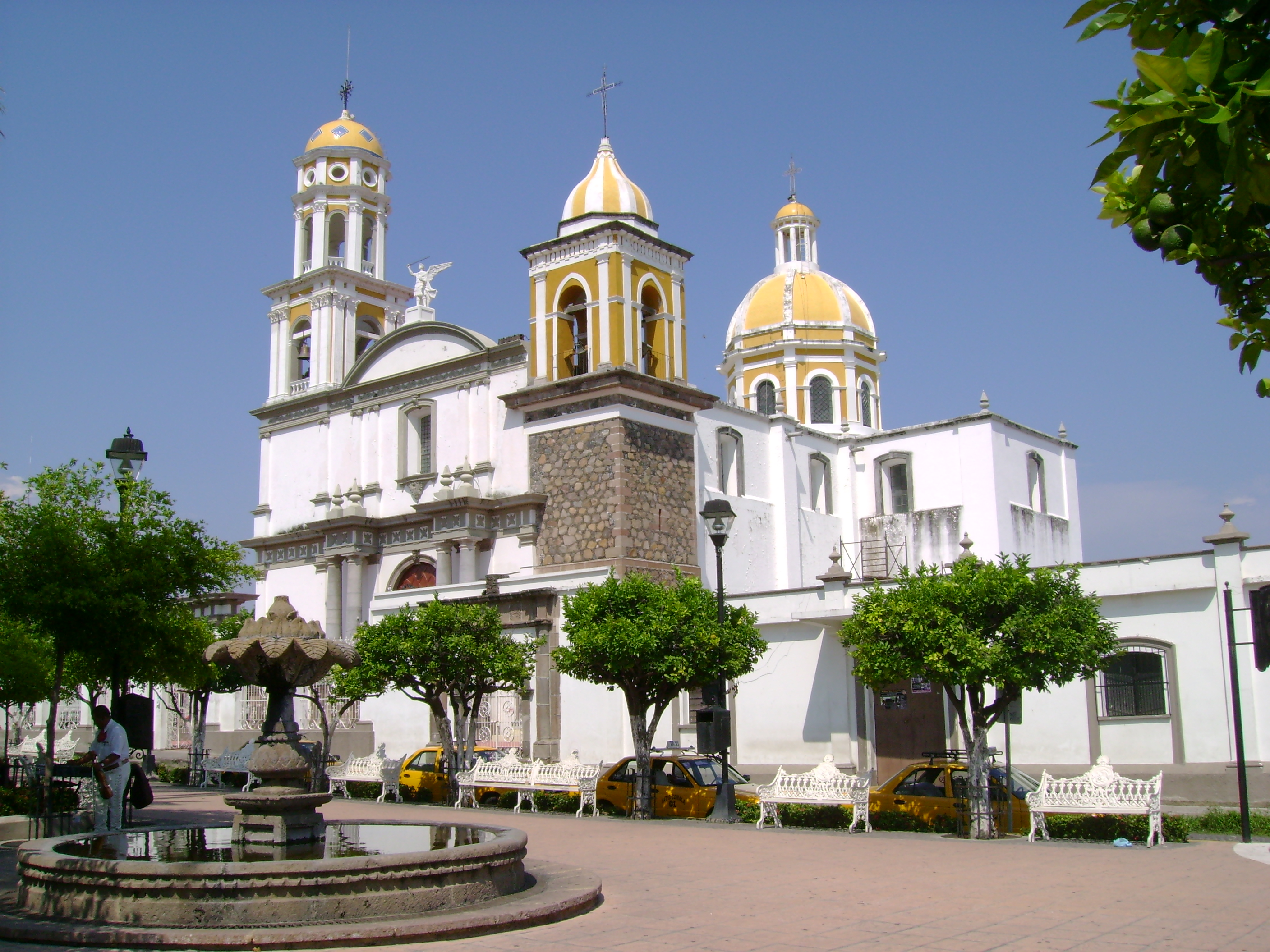 Iglesia de San Miguel Arcángel — del pueblo de Comala, en estado de Colima.